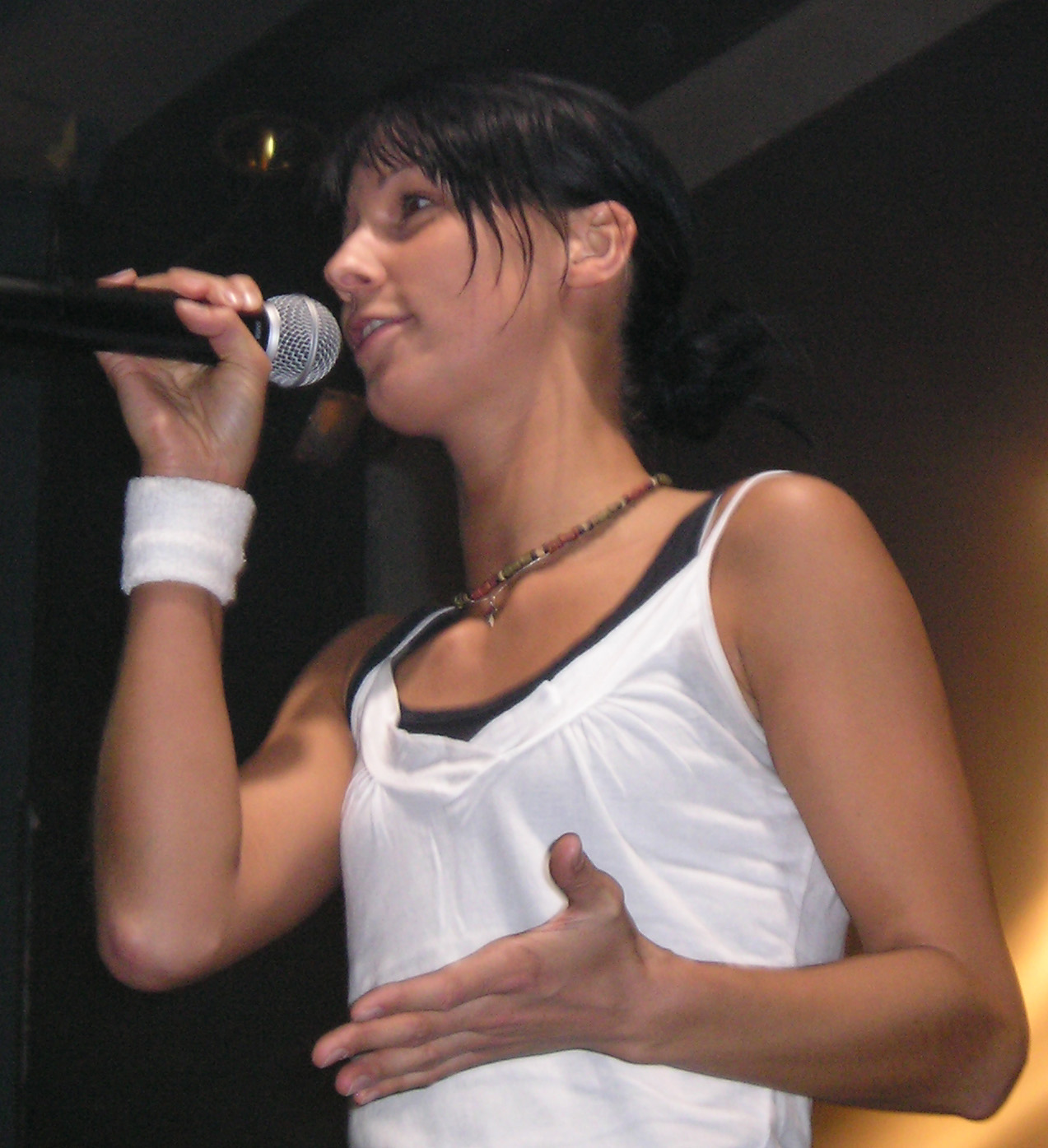 Christina Stürmer, Konzert in Hannover